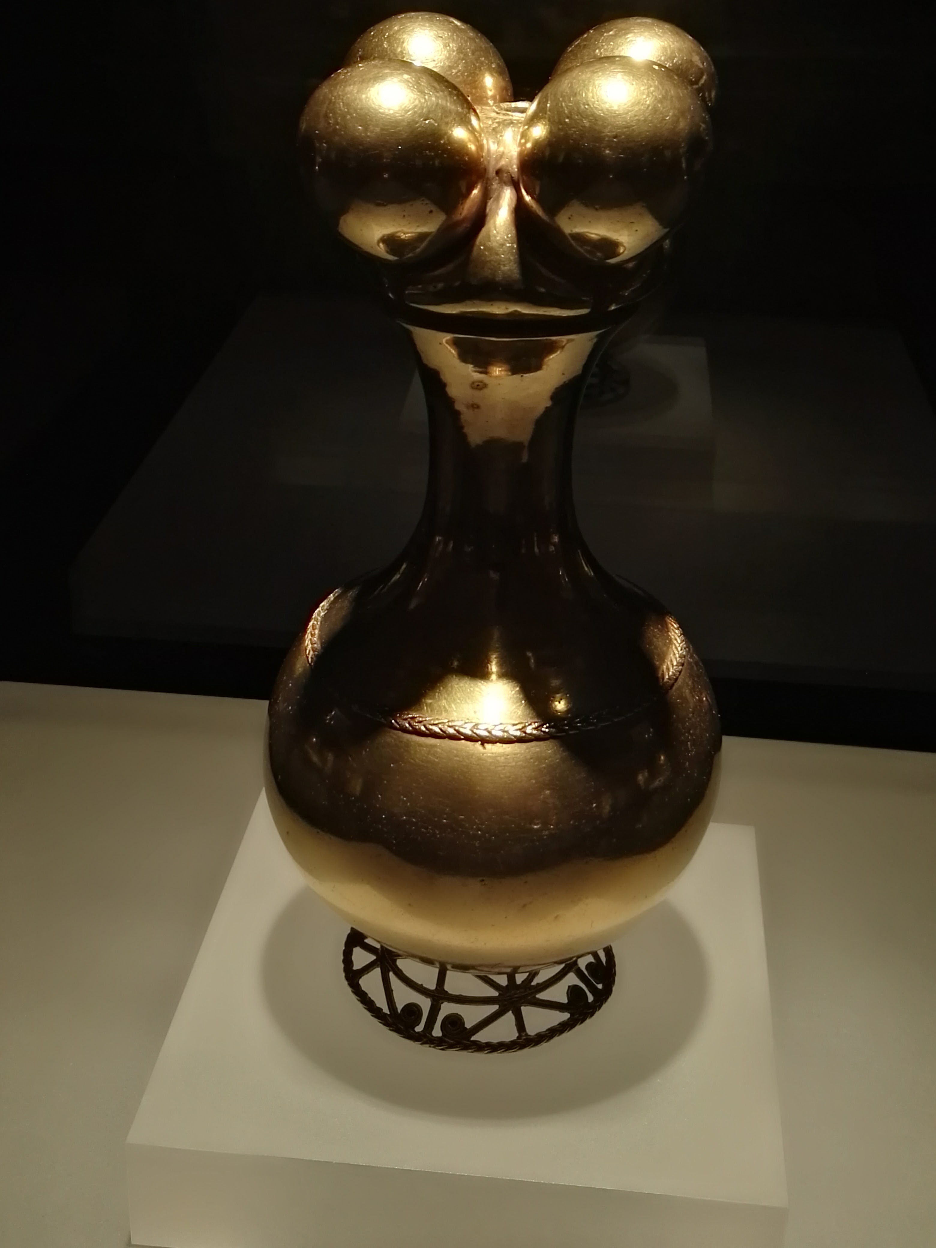 Esta fotografía fue tomada en un área protegida de Colombia con el código 654313 del RUNAP.